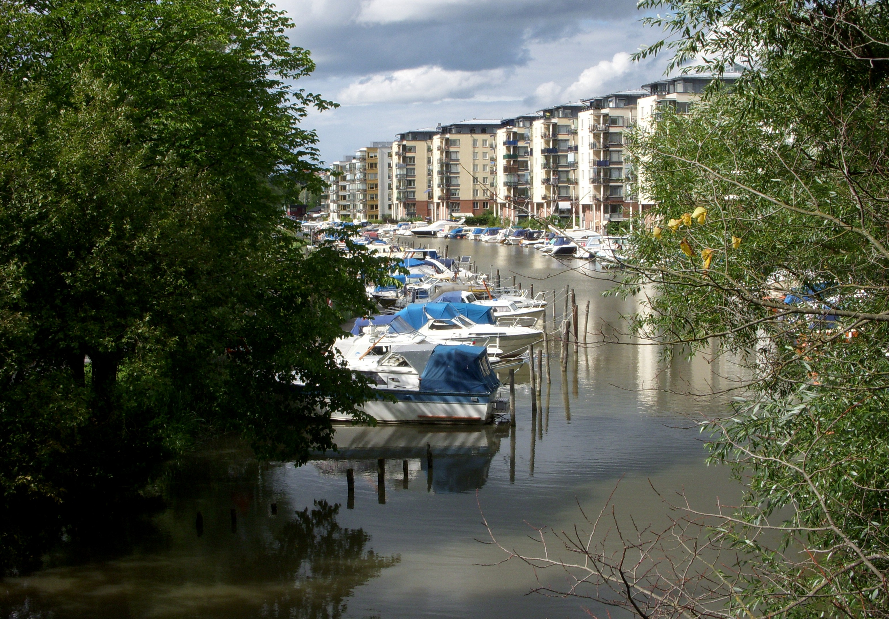 Bällstaån, från Bällstabron mellan Stockholm och Sundbyberg. Bilden tagen mot nordväst i Mariehäll, alldeles vid mynningen. Bostadshusen på bilden ligger i Sundbybergs kommun.